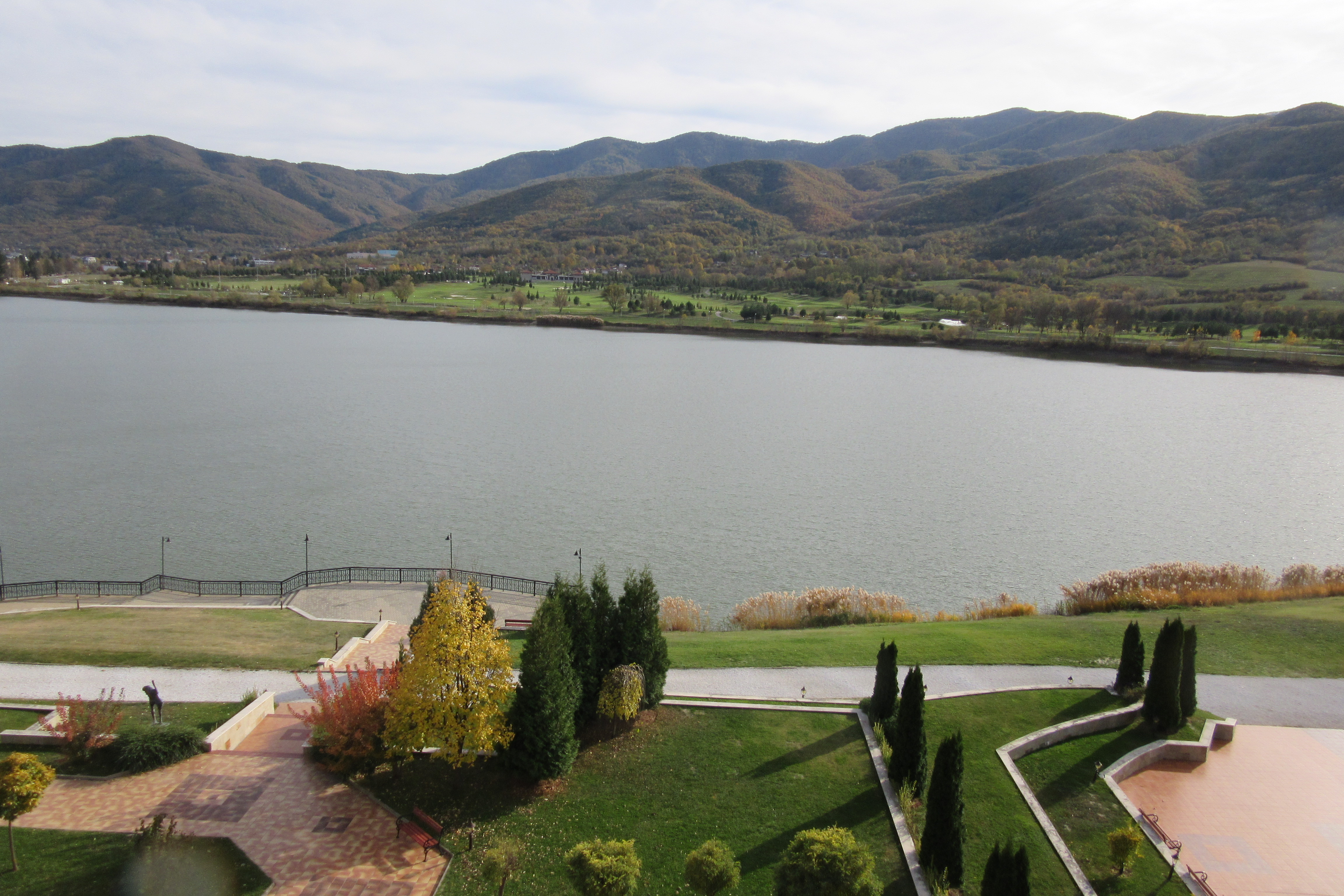 Правешкото езеро